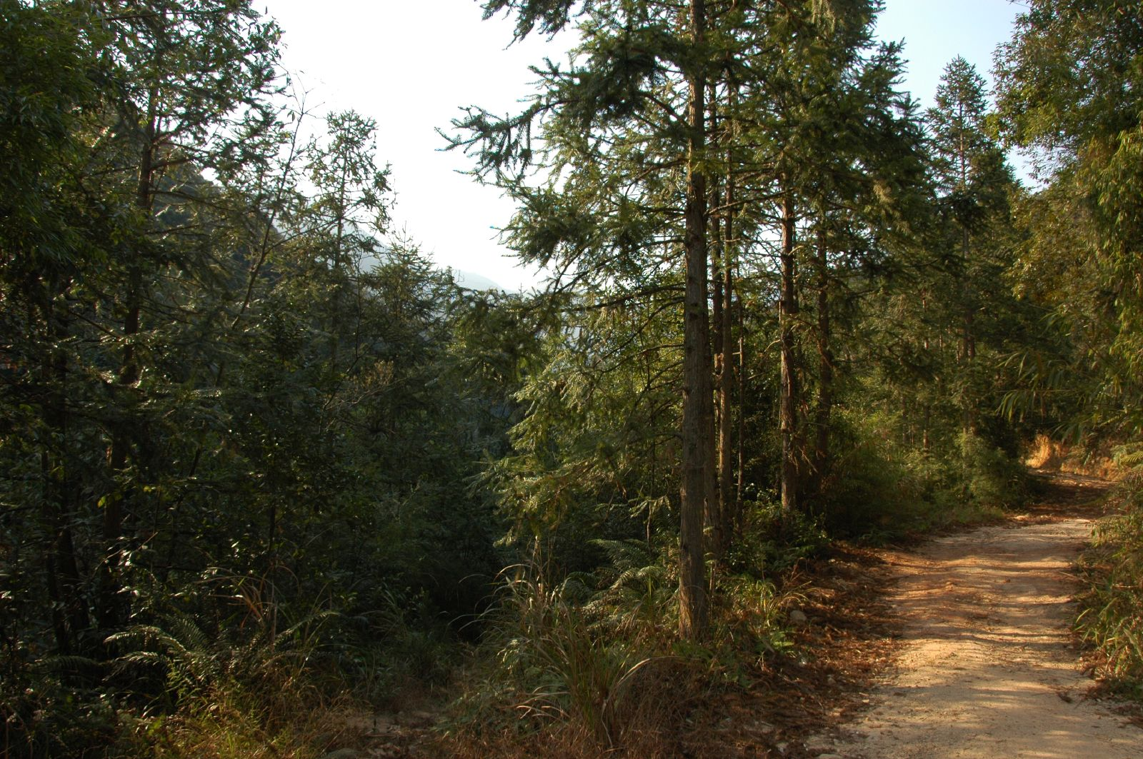 Cunninghamia lanceolata, NanKun Mountain, Guangdong, China, approx 23°39'17"N 113°48'52"E